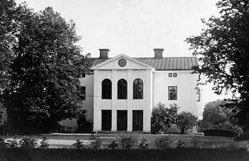 Hakunge gård i Össeby-Garn, sedd från norr